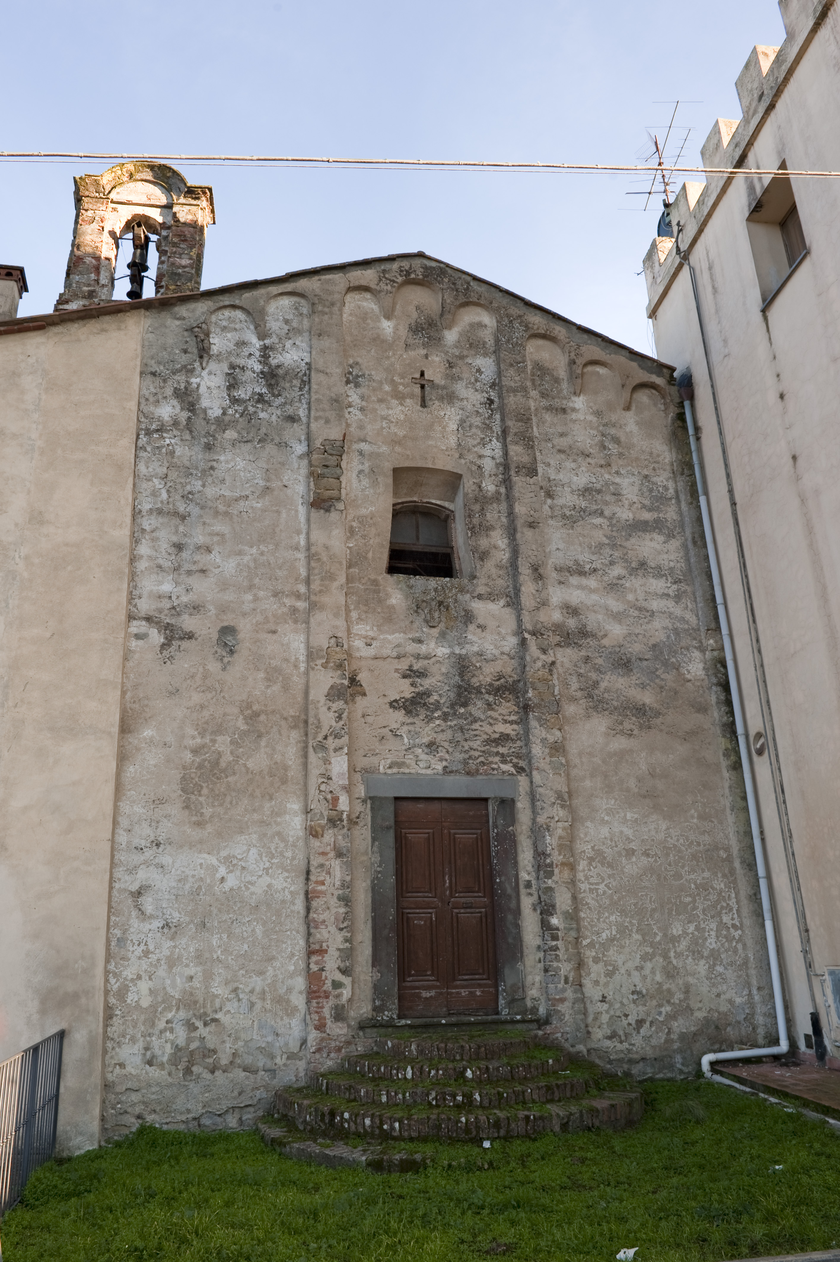 Oratorio di Santa Maria della Neve - Badia a Elmi